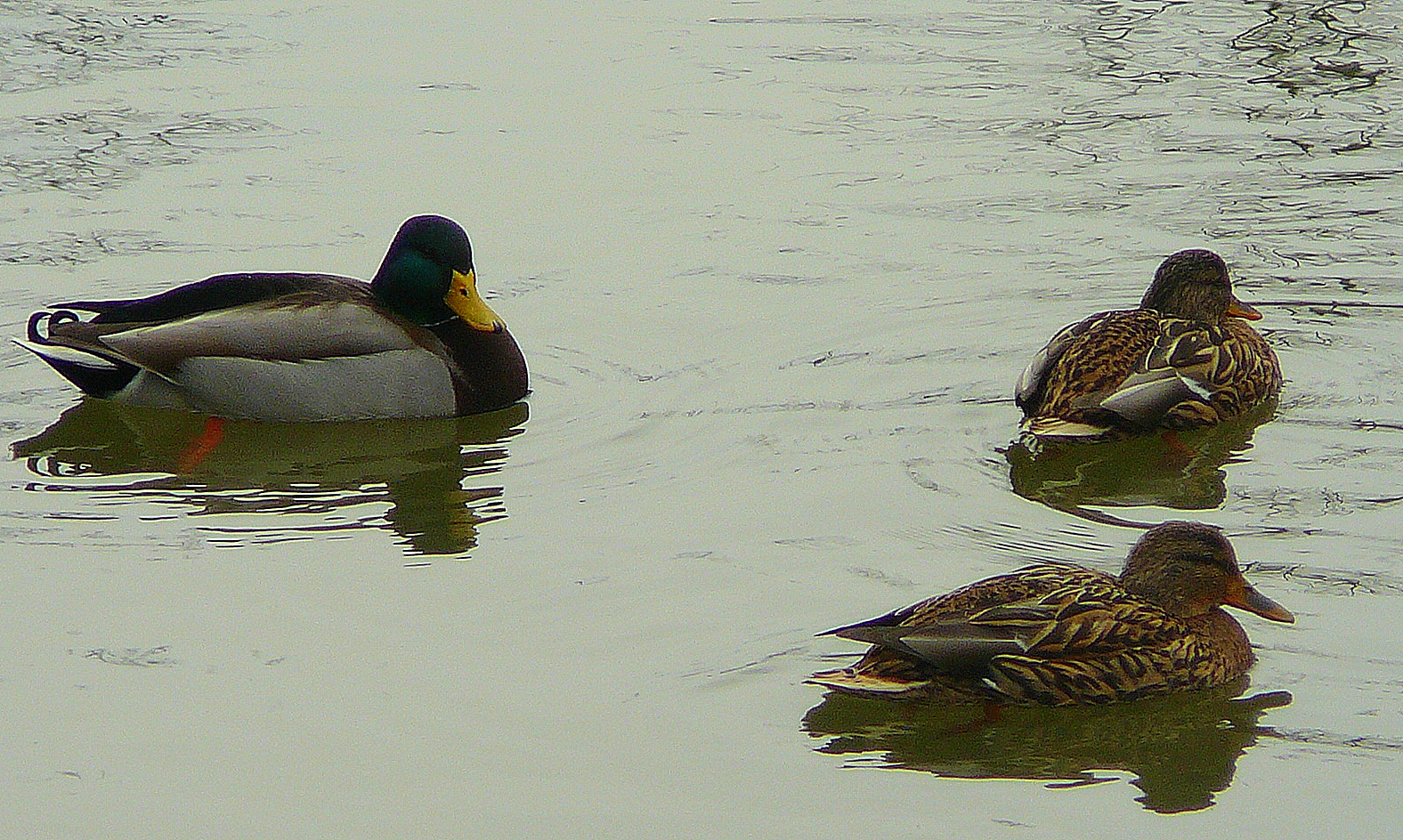 którą wybrać???